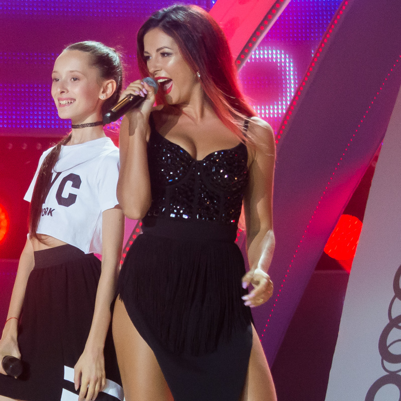 Нюша и Эден Голан на Детской Новой волне 2016